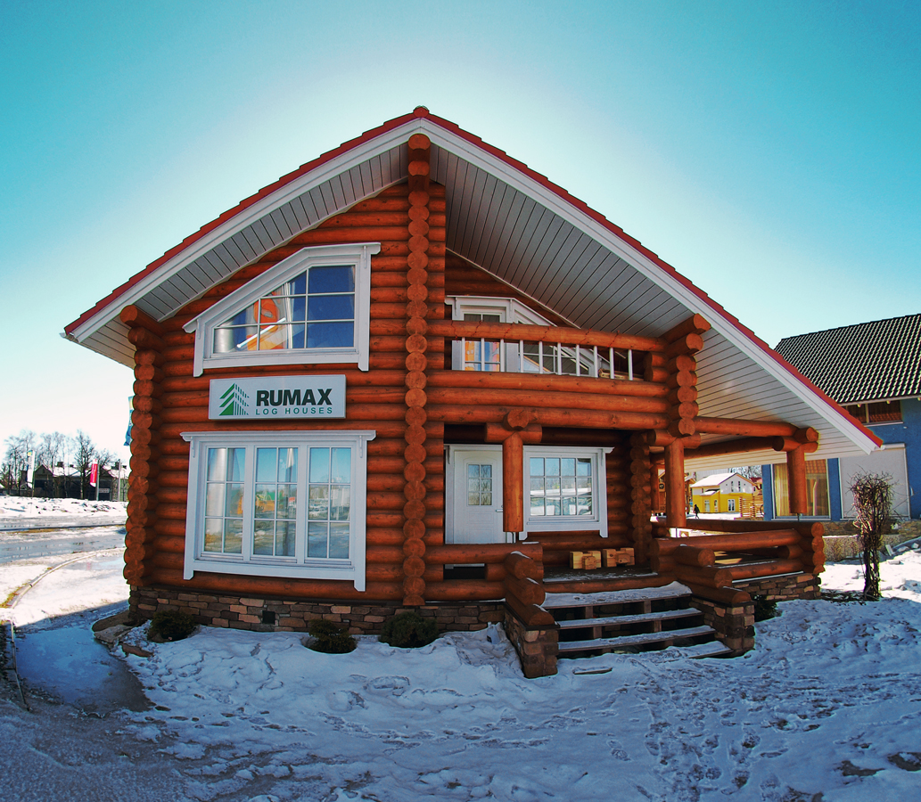 Дом из оцилиндрованного бревна в Санкт-Петербурге. Выставочный образец компании Rumax.